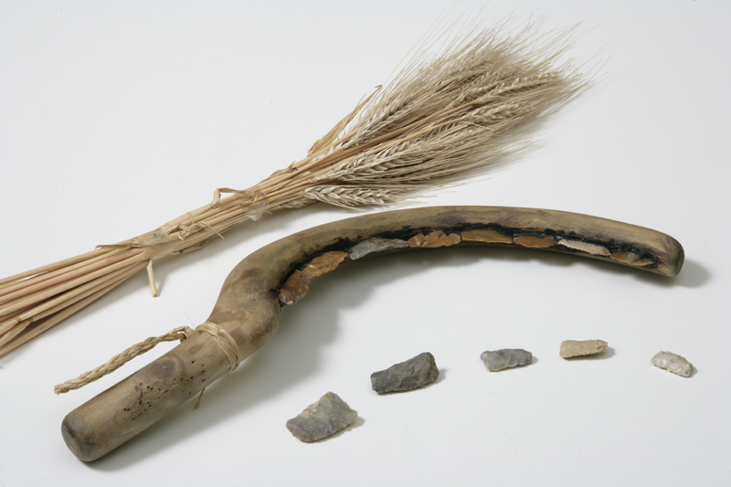 Falcetto in legno ricostruito utilizzando lame ritoccate in selce. Strumento per mietere.